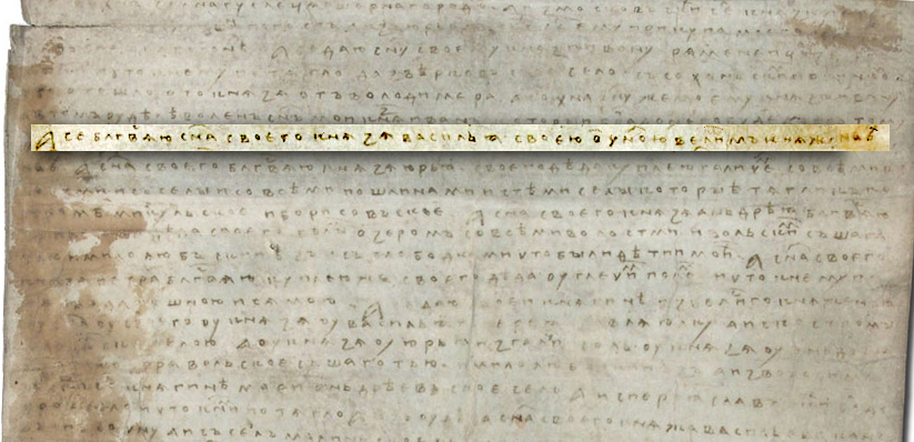 Духовная грамота князя Дмитрия Ивановича Донского